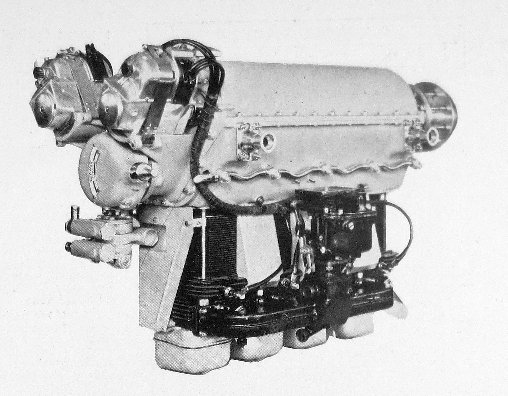 letecký motor Walter Minor 4 (1936)